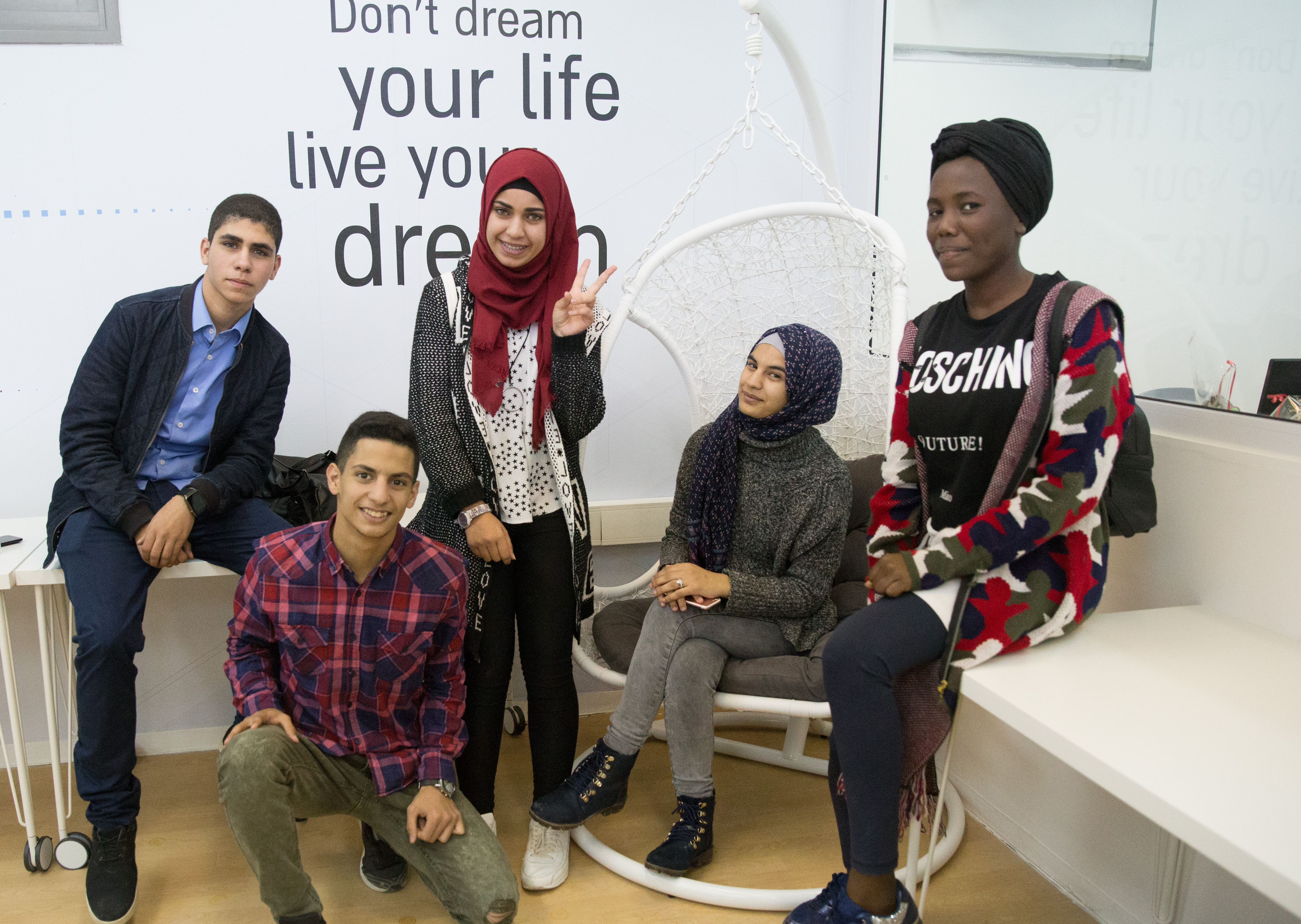 פעילות במרכז היזמות